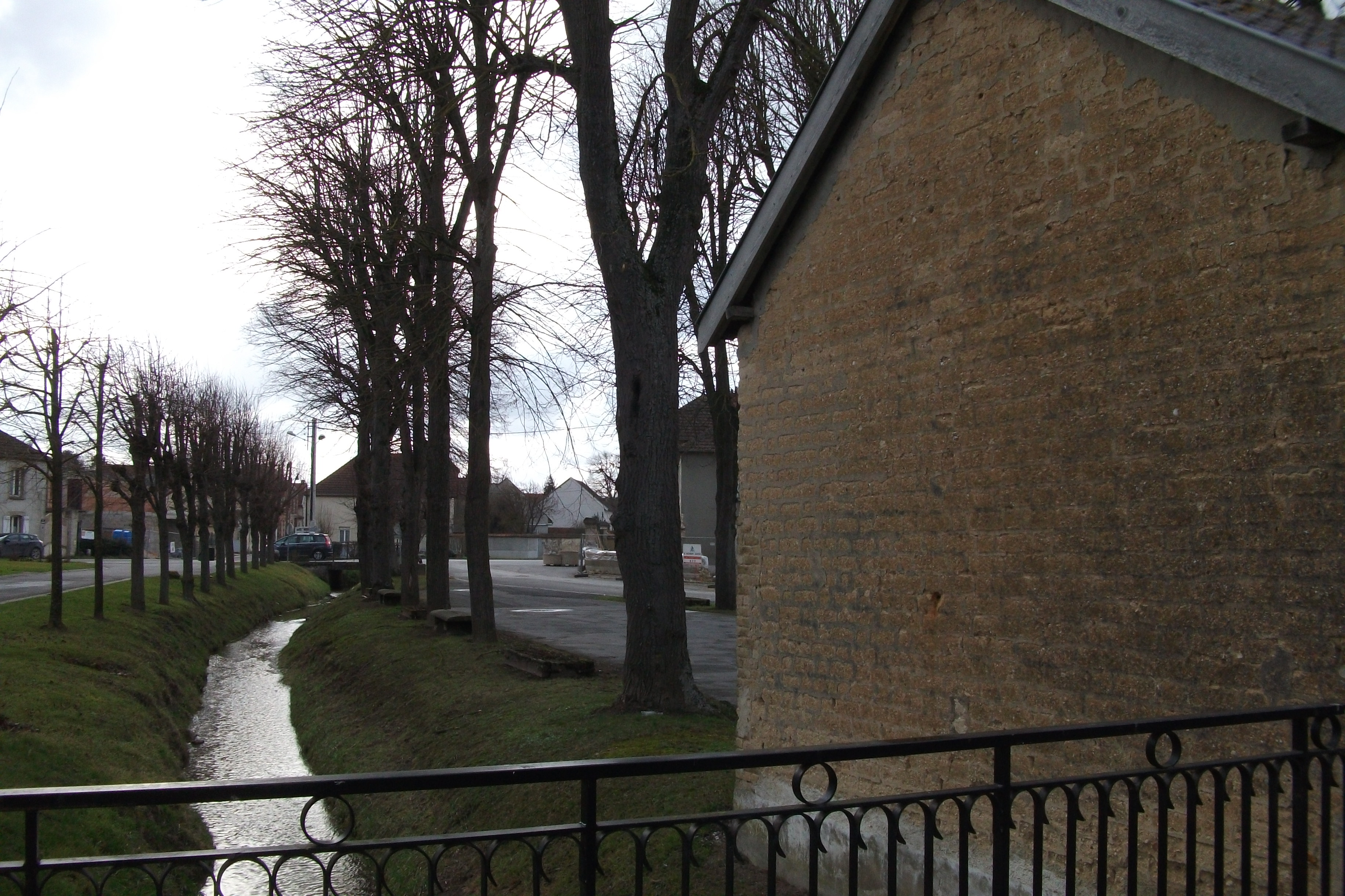 Vue du Rouillat, rivière traversant le village le long de la mairie et de l'église.